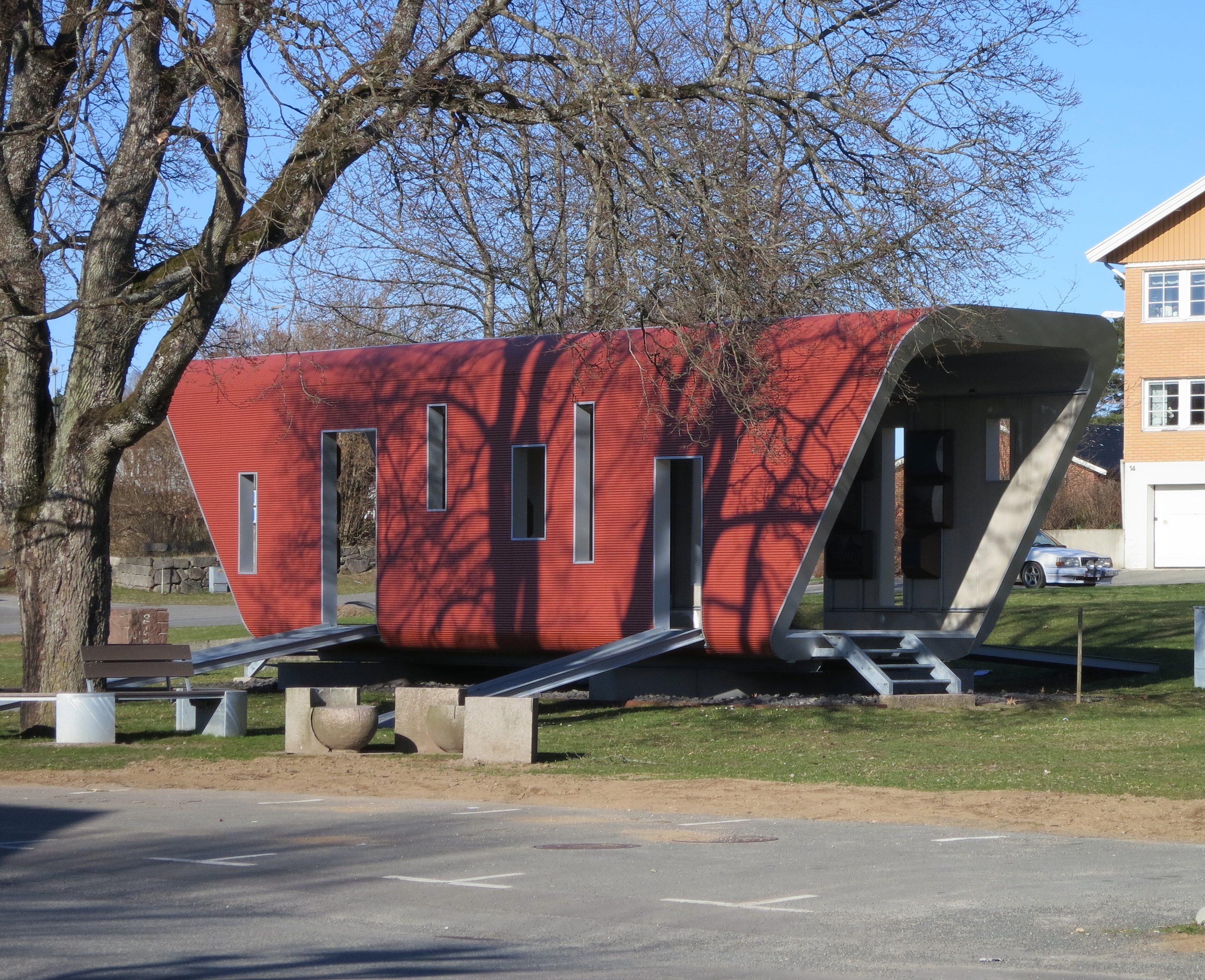 Sibbhult, mars 2014